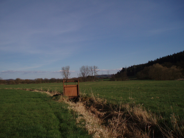 Nebenschleuse ("Schliese")